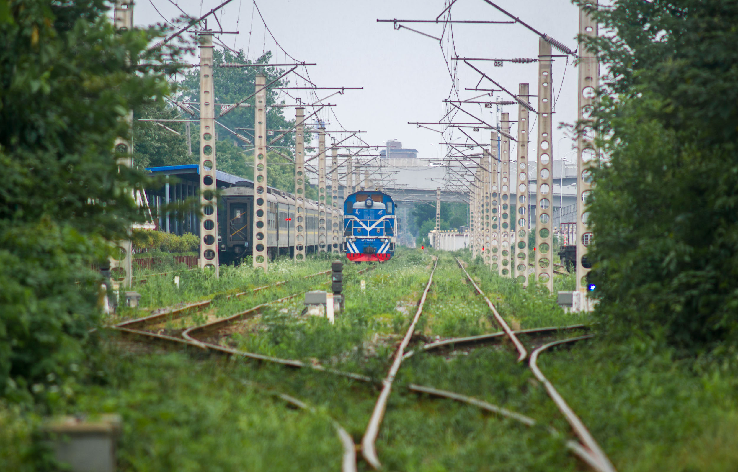 江岸站一站台，8344次通勤列车即将发出